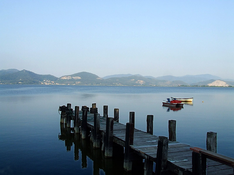 Torre del Lago Puccini, Viareggio, Toscana, Italia.